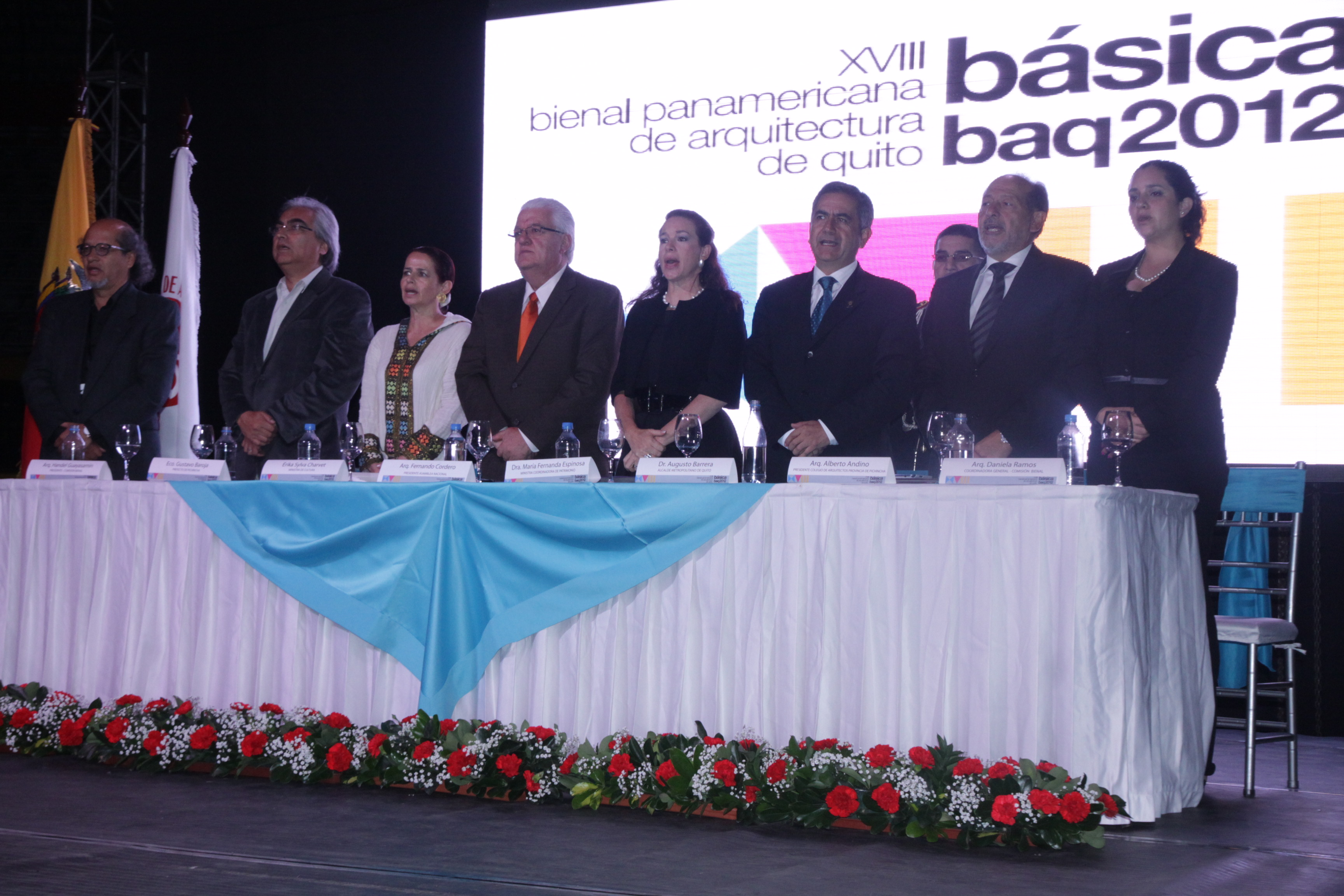 Foto: Hugo Ortiz Ron / Asamblea Nacional